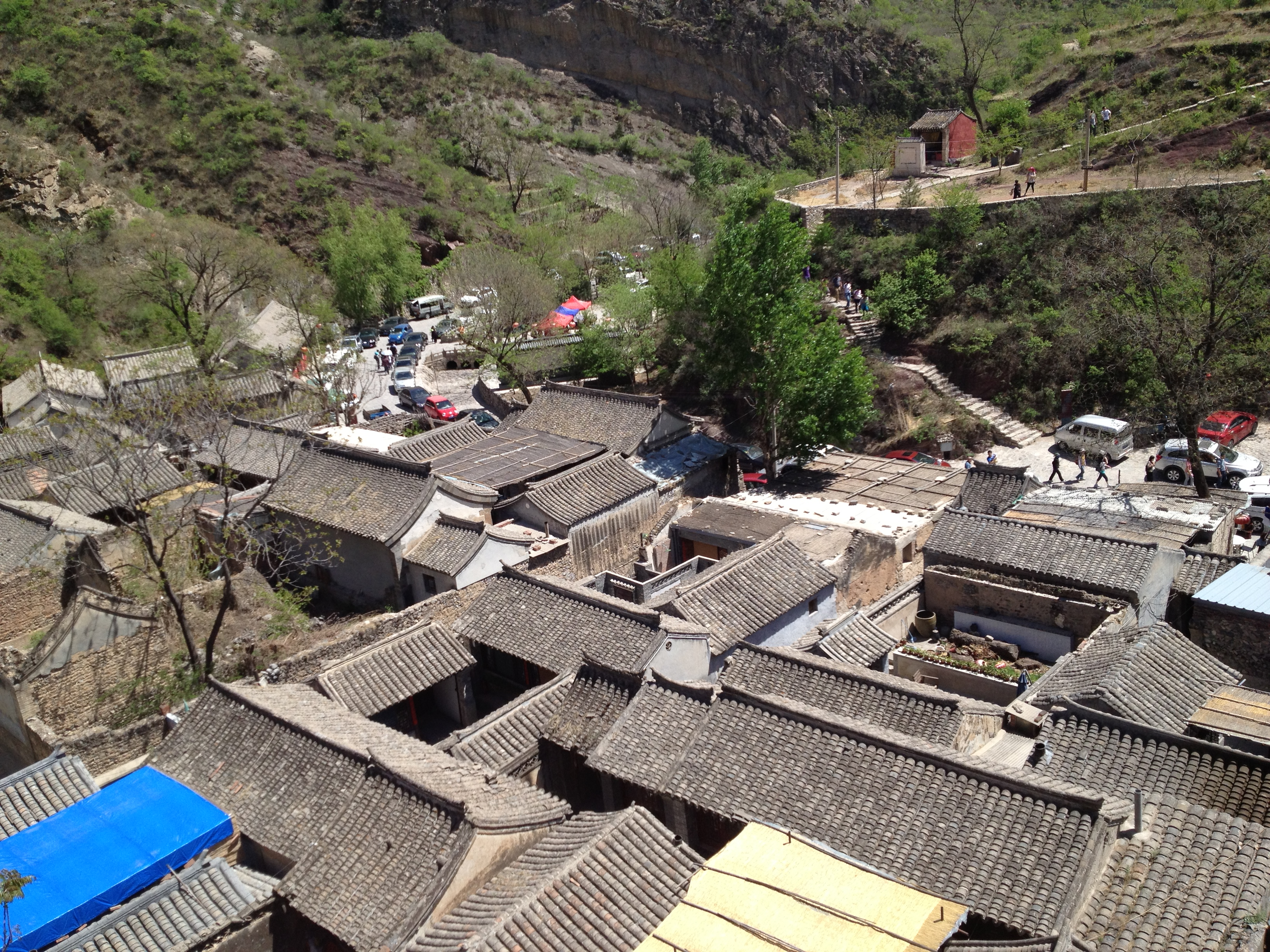 中文（中国大陆）: 北京西郊门头沟区斋堂镇爨底下村